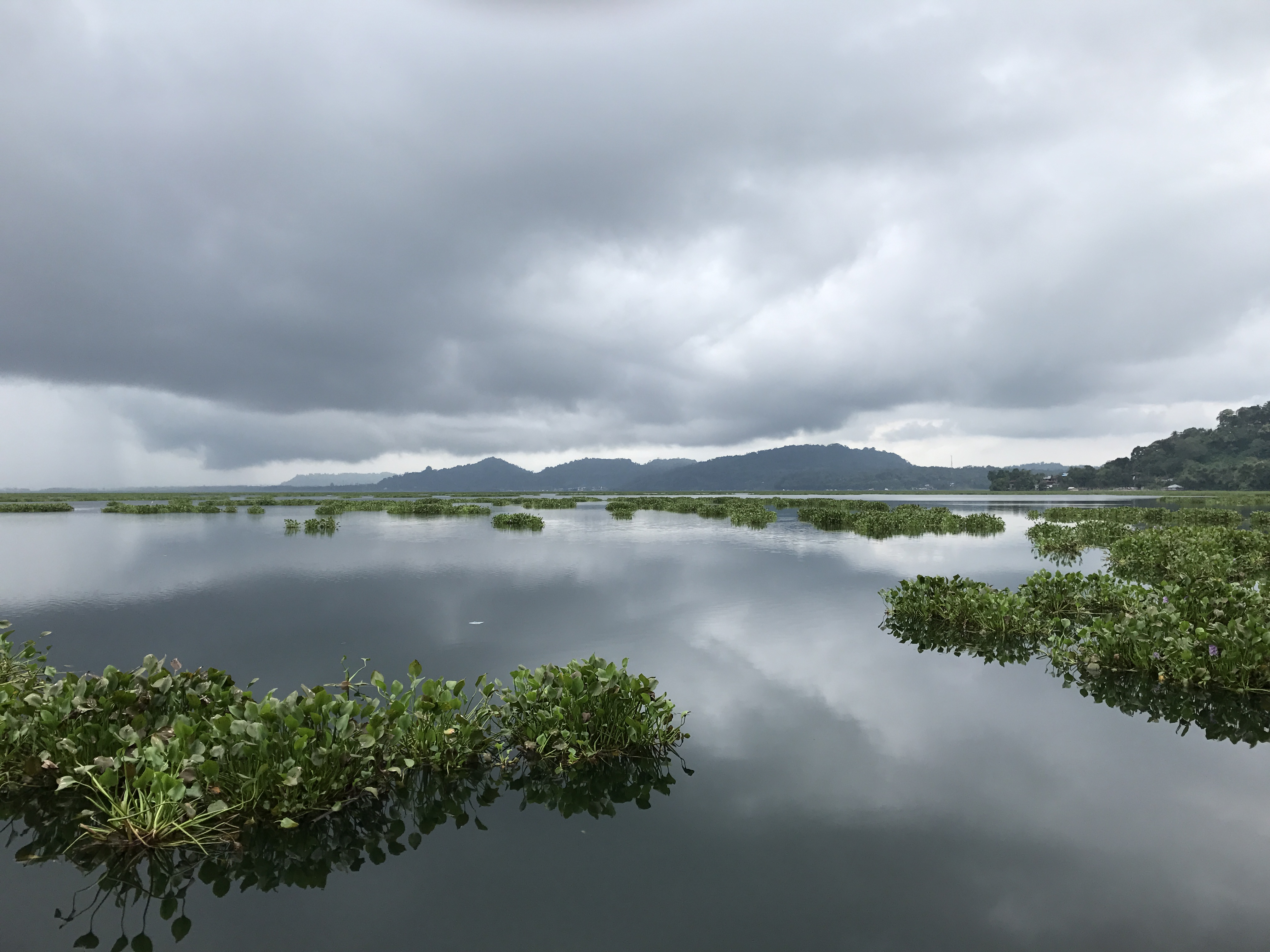 Danau Tondano adalah danau terluas di Provinsi Sulawesi Utara, Indonesia, yang luasnya mencapai 4.278 ha dengan ukuran sekitar 5 km x 11 km. Secara administratif Danau Tondano berada di kabupaten Minahasa, provinsi Sulawesi Utara. Danau ini diapit oleh Pegunungan Lembean, Gunung Kaweng, Bukit Tampusu, dan Gunung Masarang. Dan dilingkari dengan jalan provinsi dan menghubungkan Kota Tondano, Kecamatan Tondano Timur, Kecamatan Eris, Kecamatan Kakas, Kecamatan Remboken, dan Kecamatan Tondano Selatan.